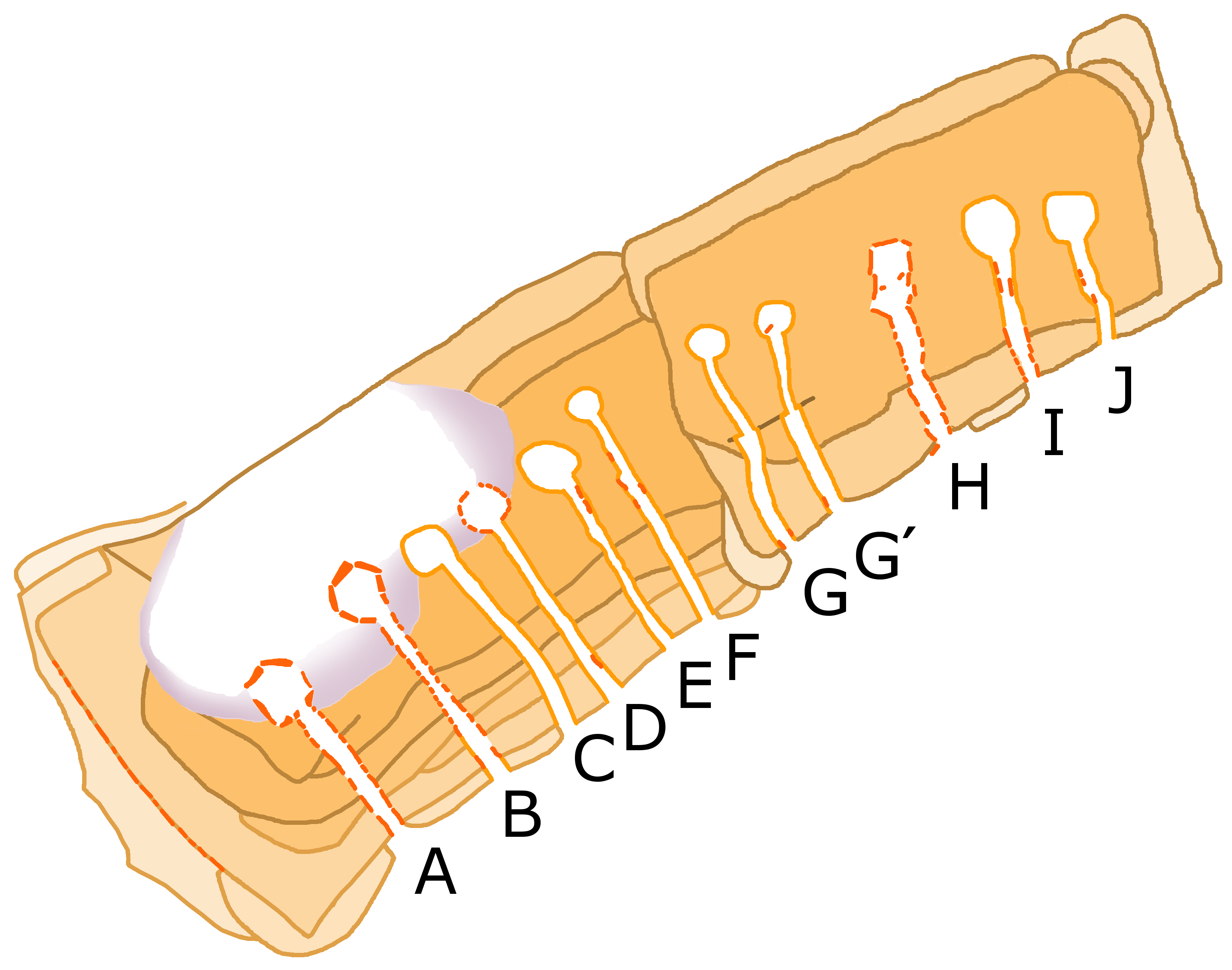 Plan du grand cairn de Barnenez, en Plouezoc'h, Finistère, Bretagne. Plan très approximatif : je n'ai pas trop respecté formes et proportions, ne cherchant qu'à faire comprendre l'organisation. Je me suis basé sur le fichier Commons « Barnenez plan.JPG » d'Athinaios (j'ai fait pivoter « nord en haut » en me fiant à la petite flèche « N »). J'ai corrigé ensuite d'après les plans d'ensemble et de détail figurant dans Pierre-Roland Giot, Barnenez, Carn, Guennoc, Université de Rennes I, 1987, t. II.